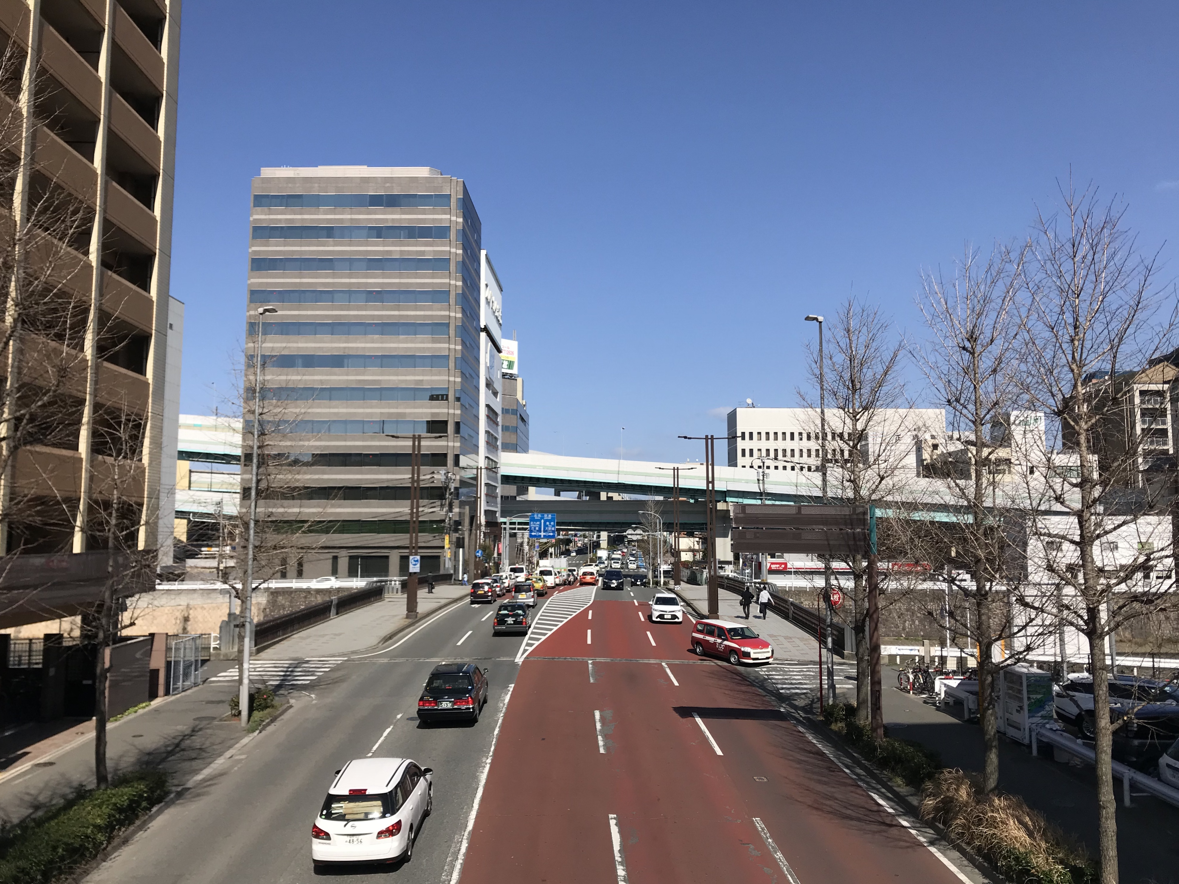 東光橋西側の歩道橋より望む国道385号(空港通り)